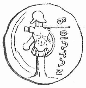 Böotische Münze mit einem Tropaion.